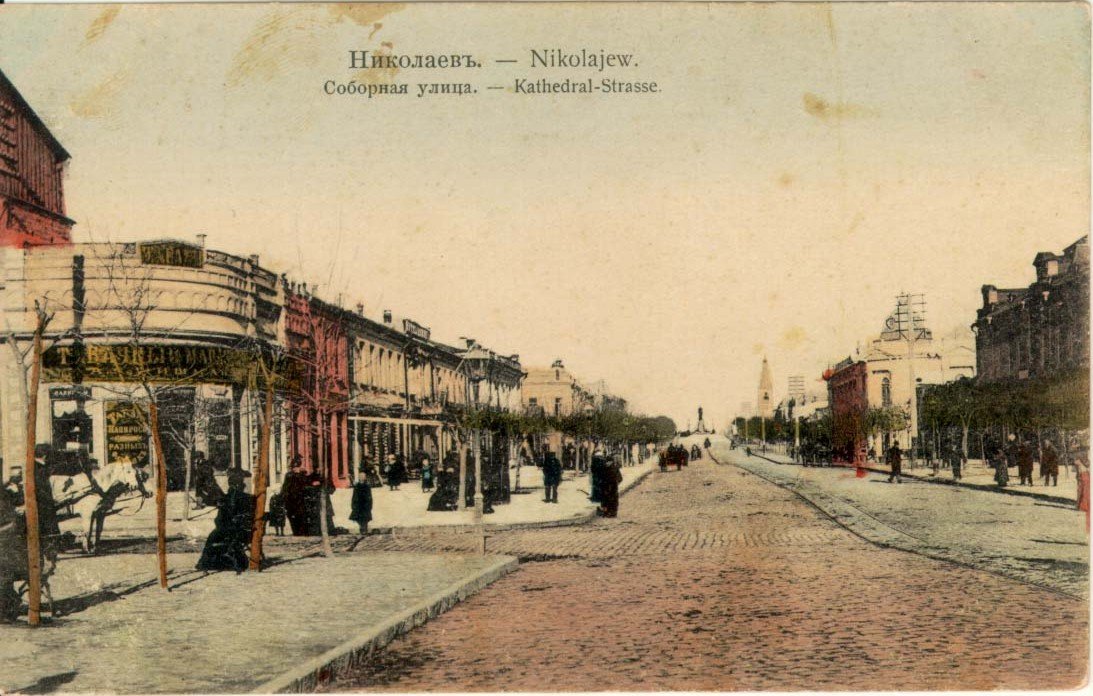 „Nikolajew. Kathedral-Strasse.“